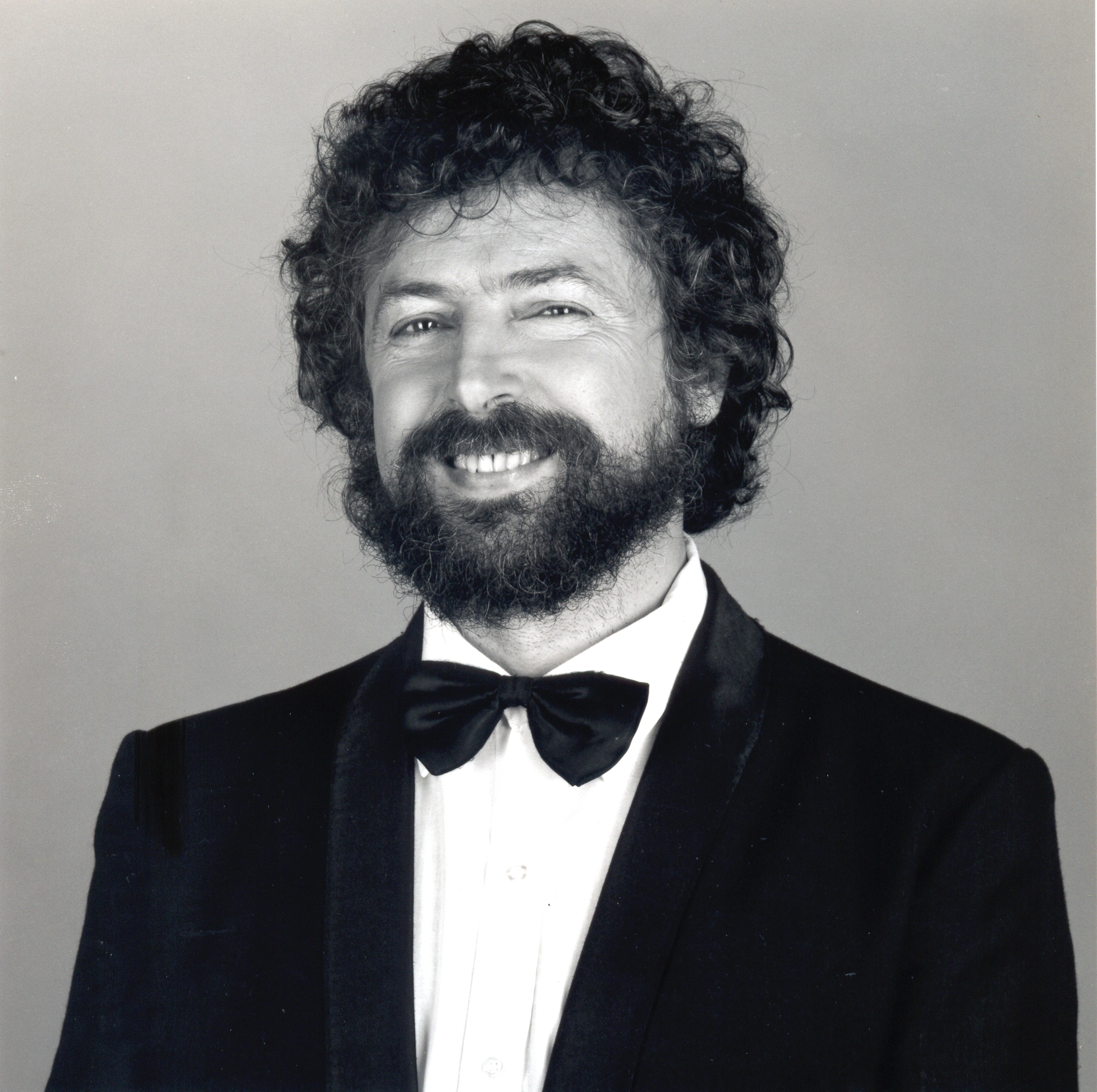 Carlos Núñez Cortés, integrante de Les Luthiers